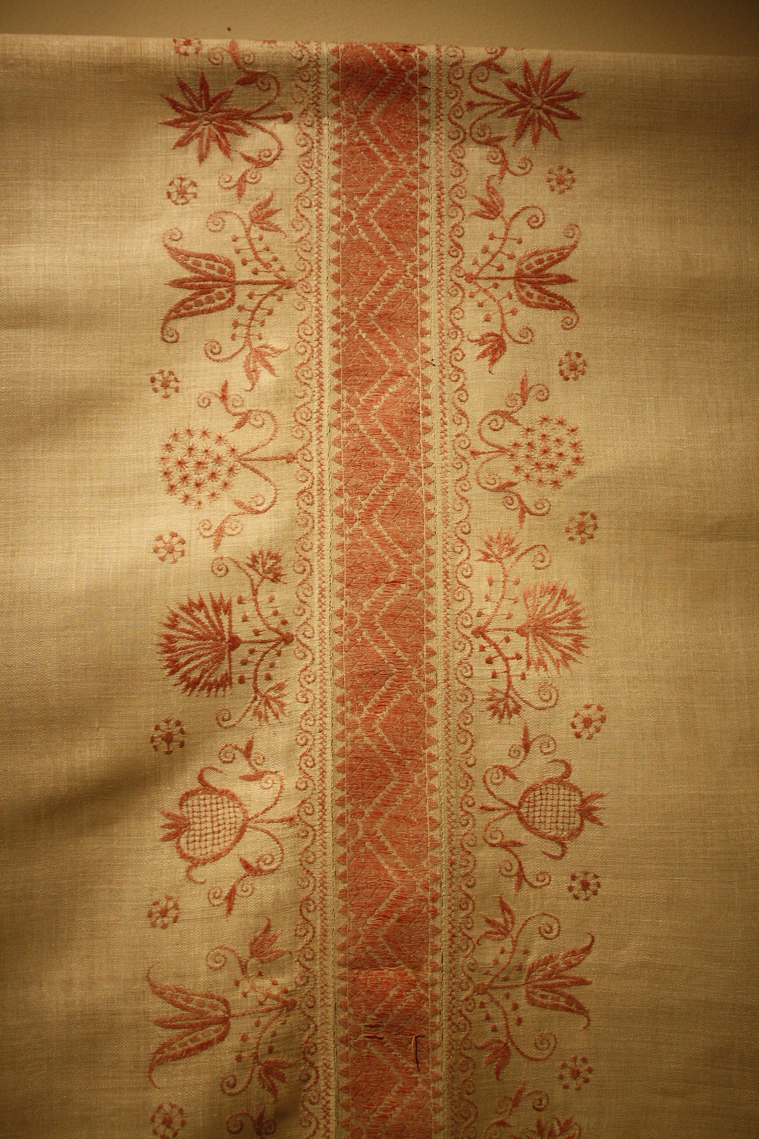 Národopisné muzeum - Musaion